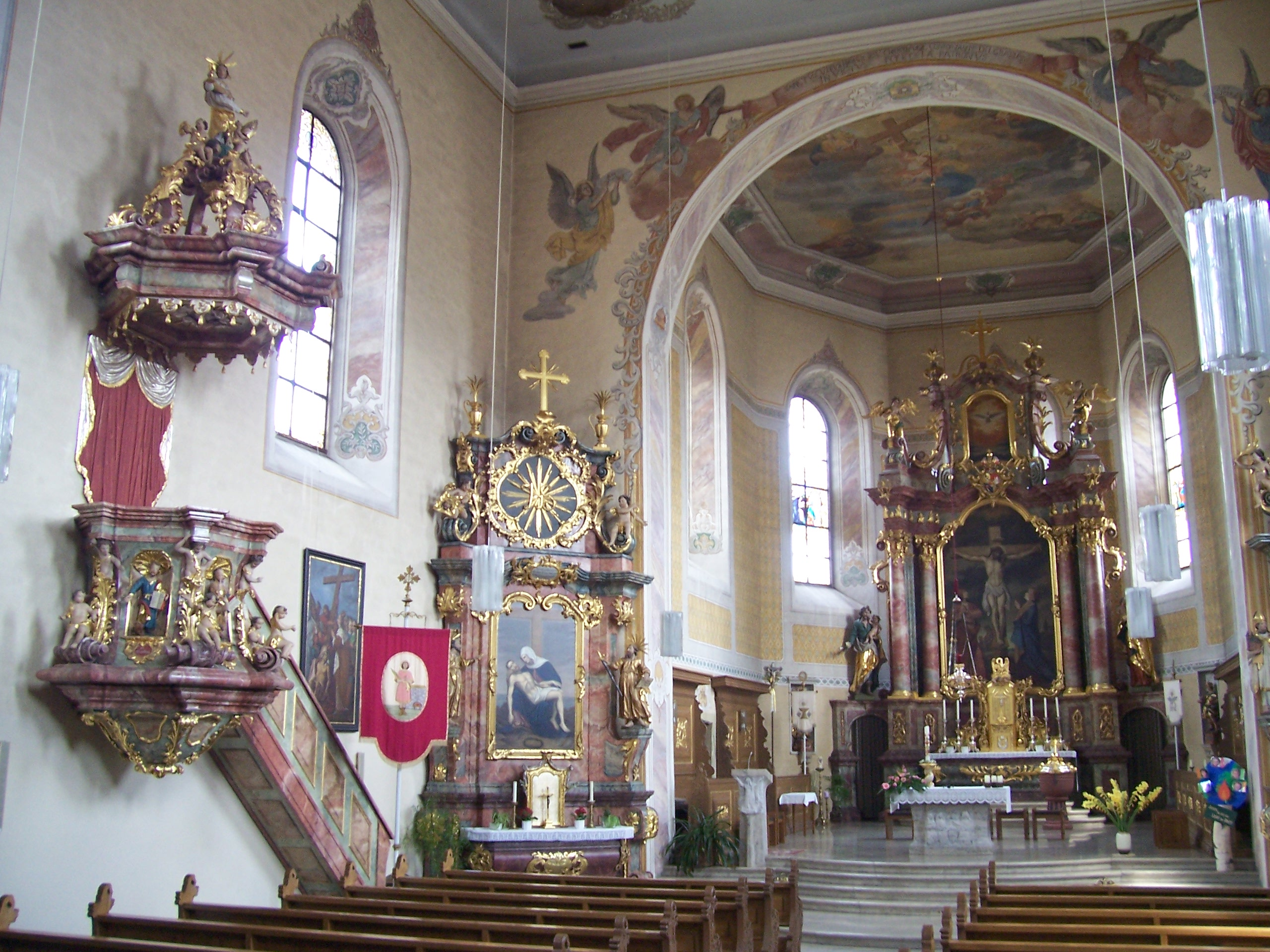 St. Vitus in Dittigheim (Tauberbischofsheim). Kanzel stammt aus der 1744 abgebrochenen Prämonstratenser-Klosterkirche in Gerlachsheim. Linker Seitenaltar: Altargemälde der Pieta (Würzburg 1878) ersetzte Bild des St. Nikolaus. Hochaltar: von Mathias Walser (1754), Altarbild von Wilhelm Dürr (Freiburg 1880) des Jesus am Kreuz ersetzte Bild des St. Vitus. Decken- und Wandgemälde von Michael Wolcker aus Würzburg (18. Jh.).